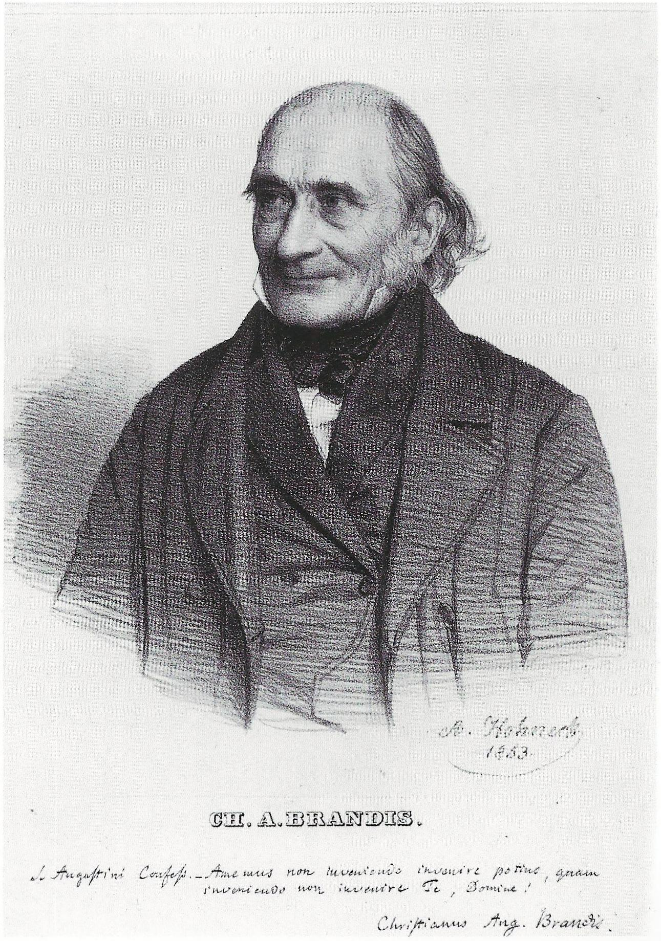 Christian August BrandisBild: 20,8 x 23,8 cm, Blatt 21 x 29,5 cmAutogramm: Augustini confehs. - Amemius non inveniendo invenire potius, quam inveniende non inveniere Te, Domine, Christianus Aug. Brandis